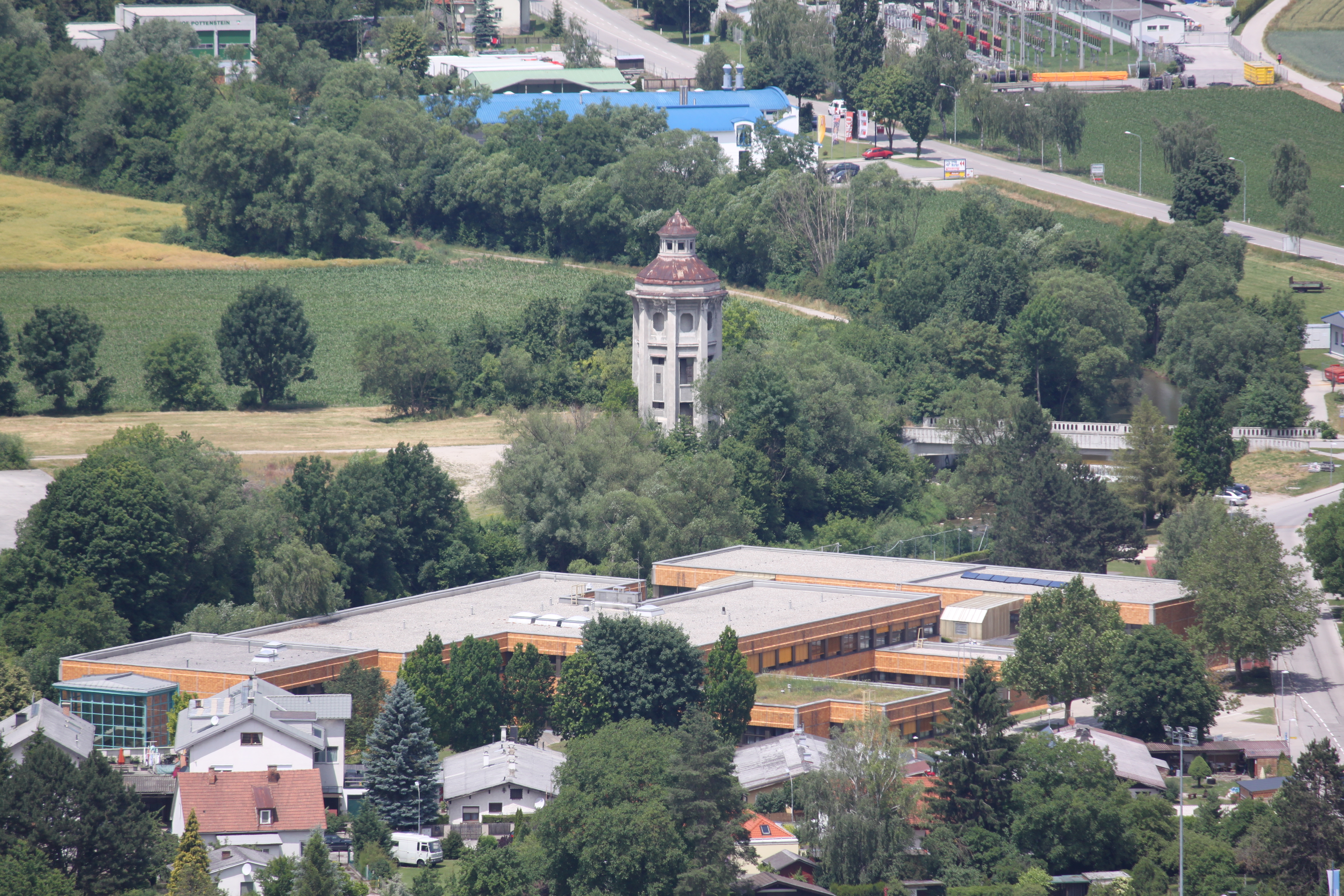 Wasserturm d. ehem. Zimmermann-Fleischwerke. Davor das neue Gymnasium mit Flachdächern. Fotostandpunkt Jubiläumswarte Guglzipf.Stadtgemeinde Berndorf: Marktgemeinde Pottenstein